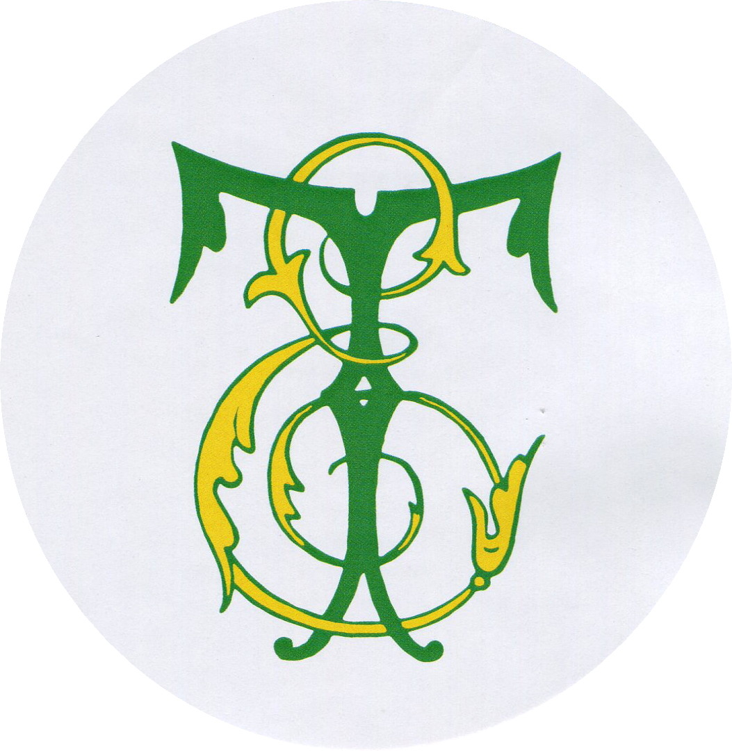 Ernest Thiels monogram på första konstkatalogen från 1904